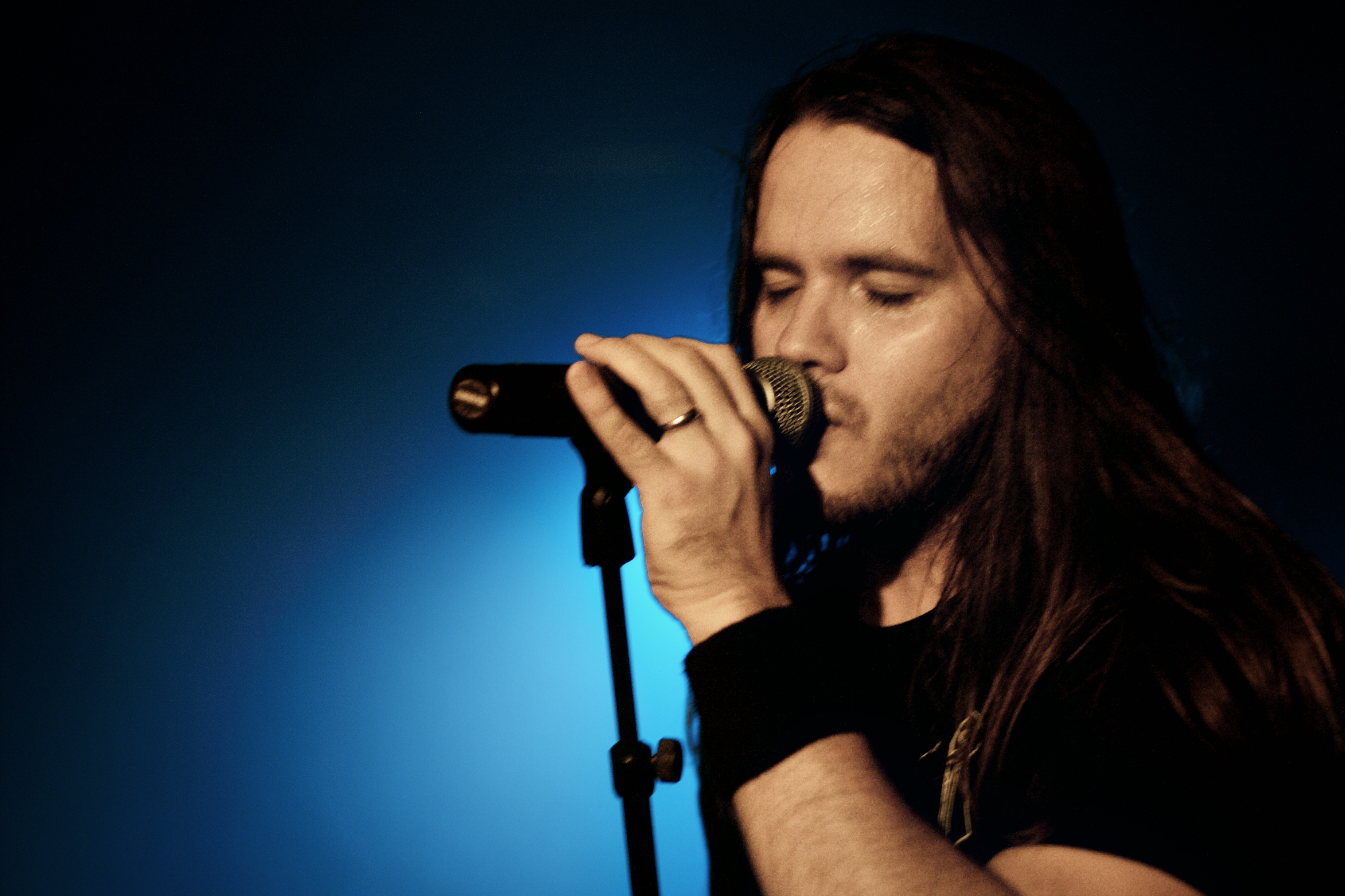 Theocracy en concert en suisse en 2011